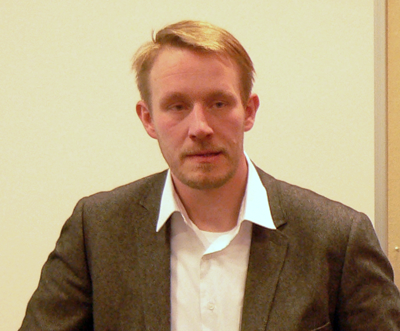 Mario Pahlow